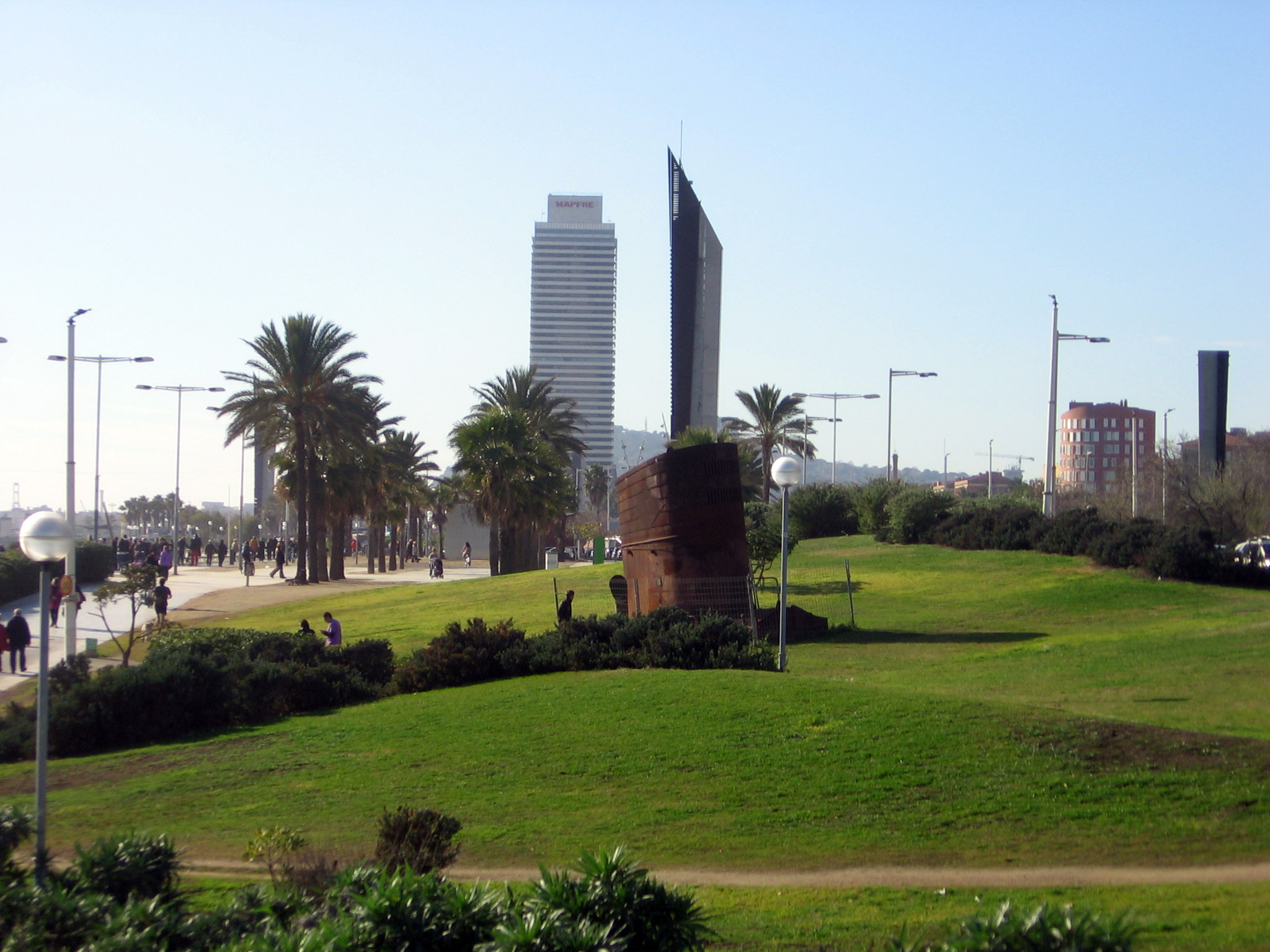 Parque del Poblenou.